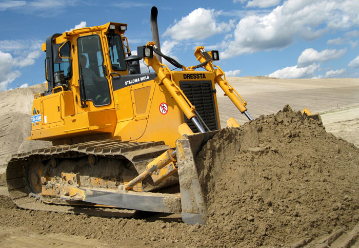 Spycharka gąsienicowa TD-15M Extra marki DRESSTA STALOWA WOLA